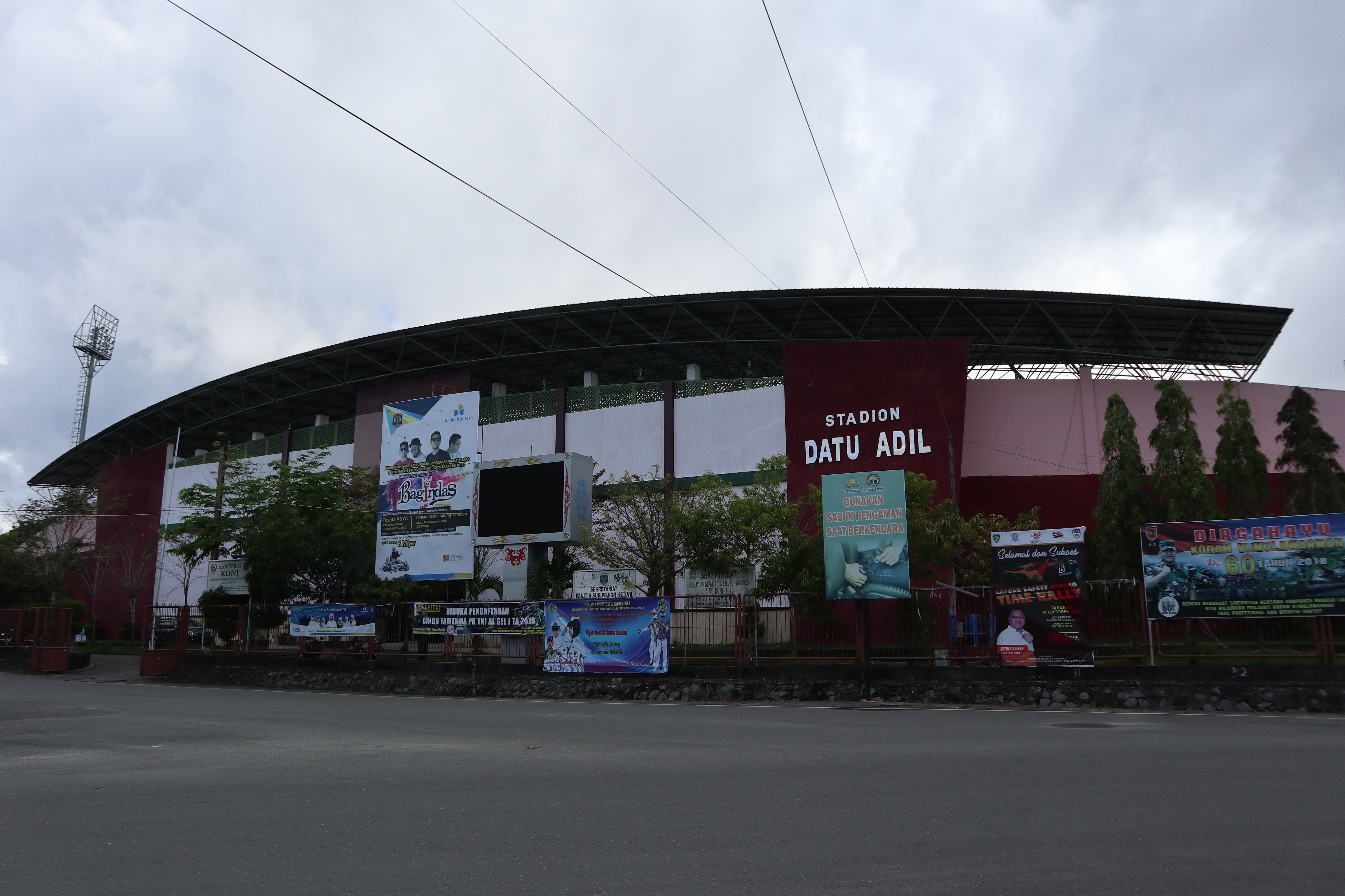 Stadion Datu Adil di Kota Tarakan.